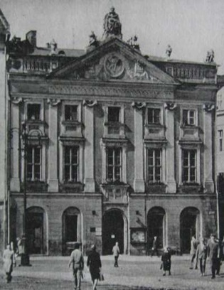 споруда